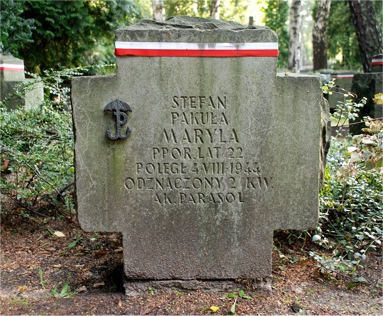 gróg Stefana Pakuły na Powązkach wojskowych w Warszawie